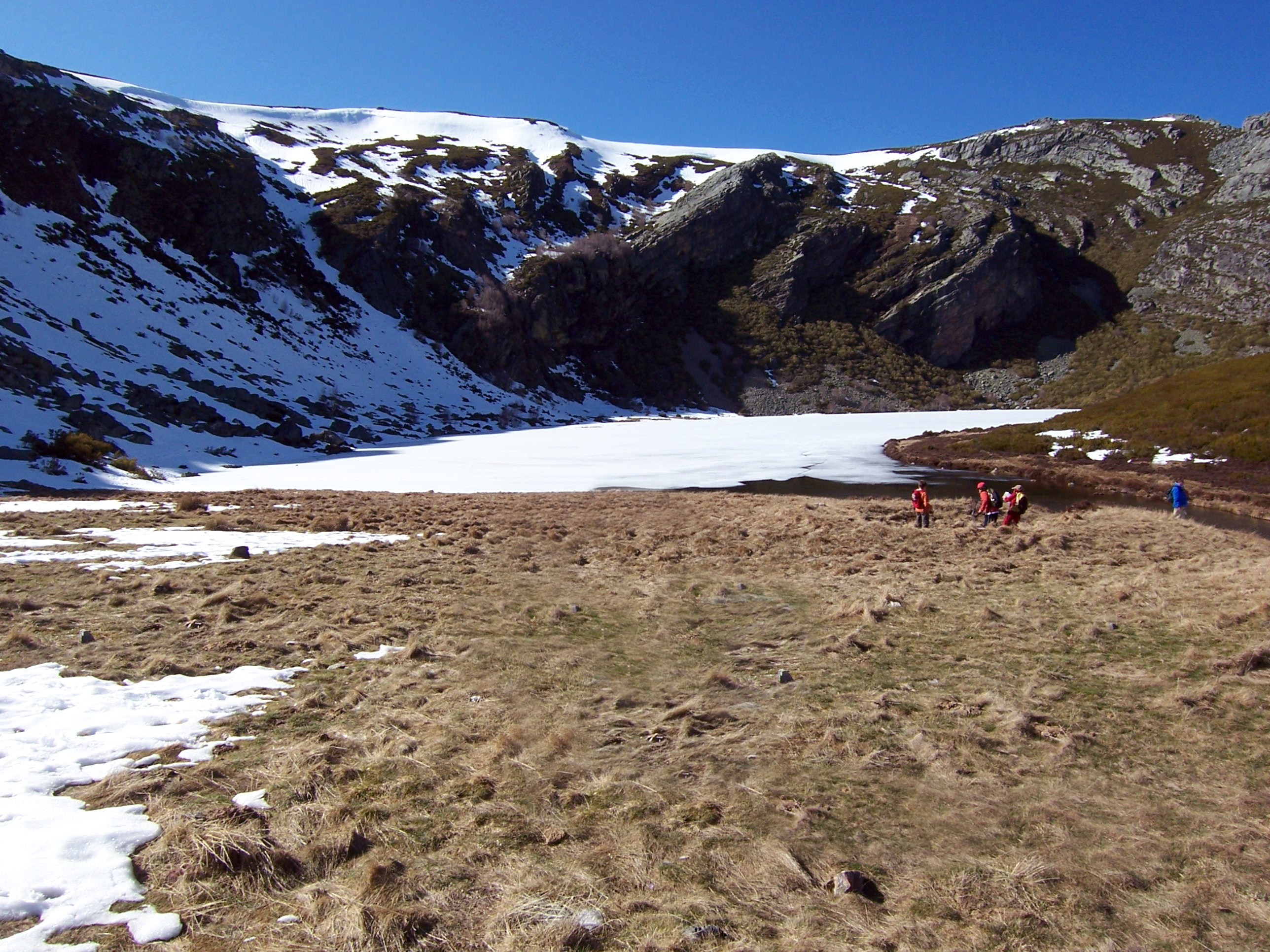 Lago de Truchillas, en la comarca de La Cabrera (León).